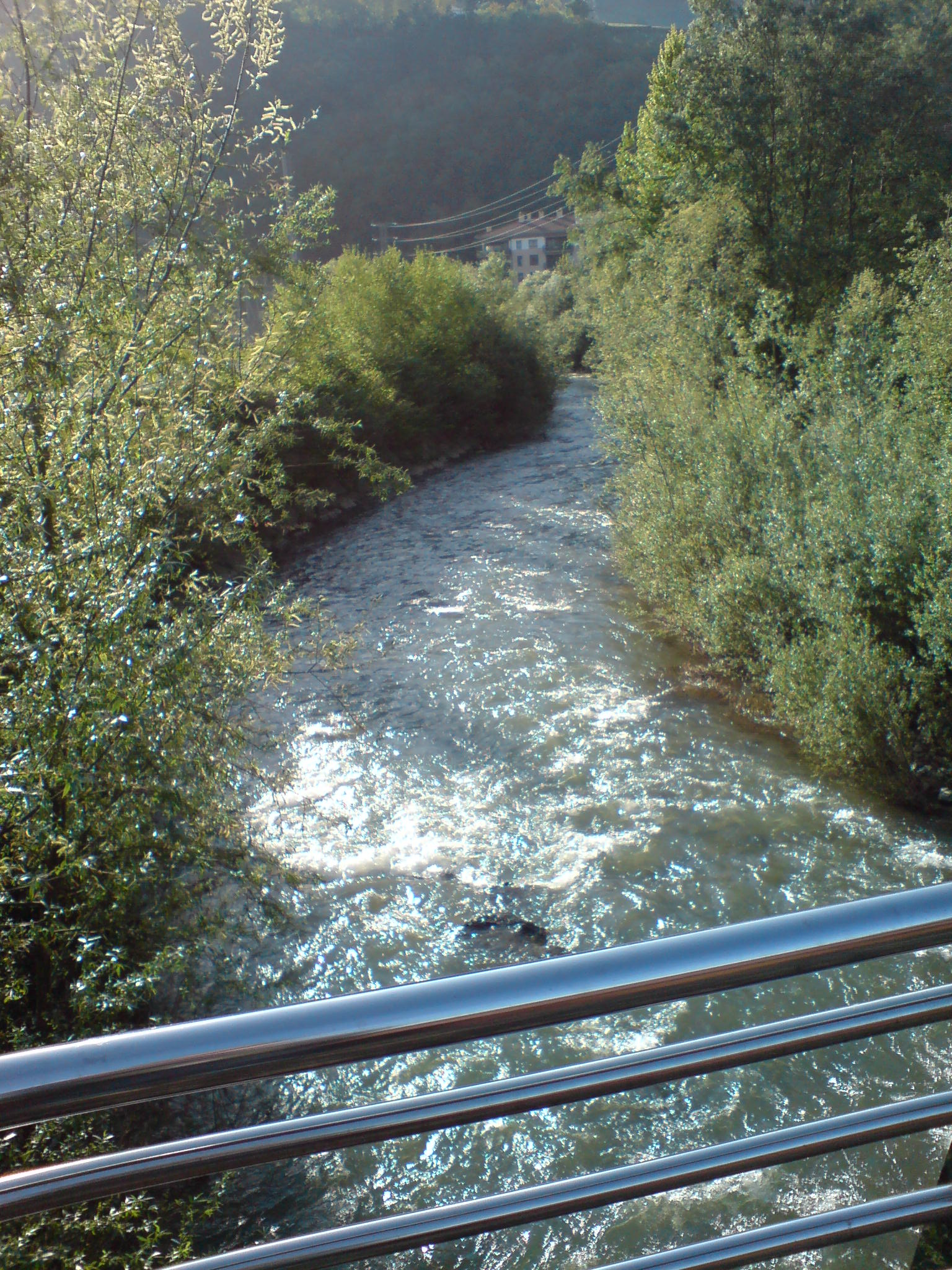 Tolosa Rio Araxes, poco antes de unirse al Rio Oria, visto desde el puente junto al Polideportivo Usabal